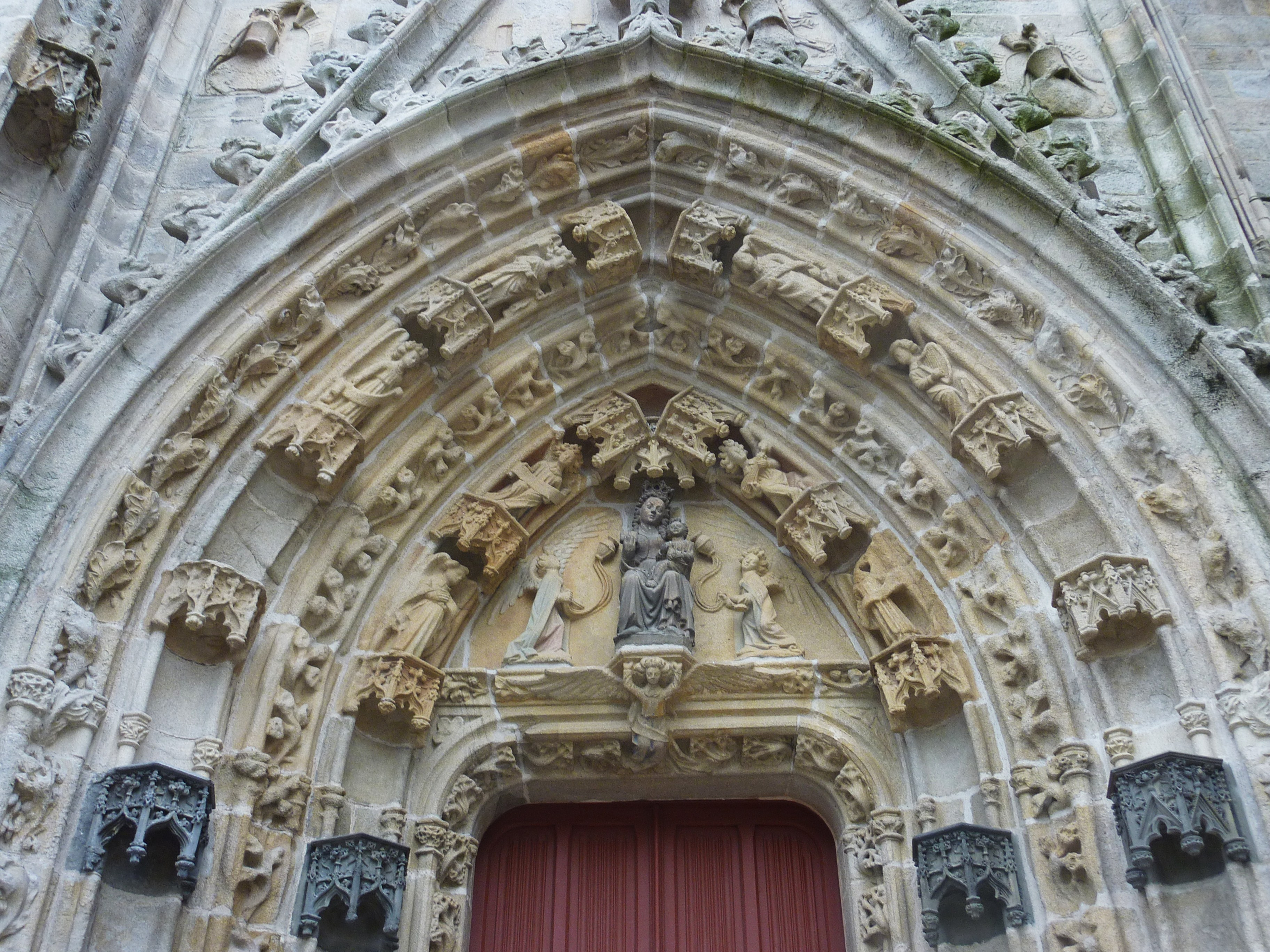 Cathédrale Saint-Corentin de Quimper : le portail sud (détail)